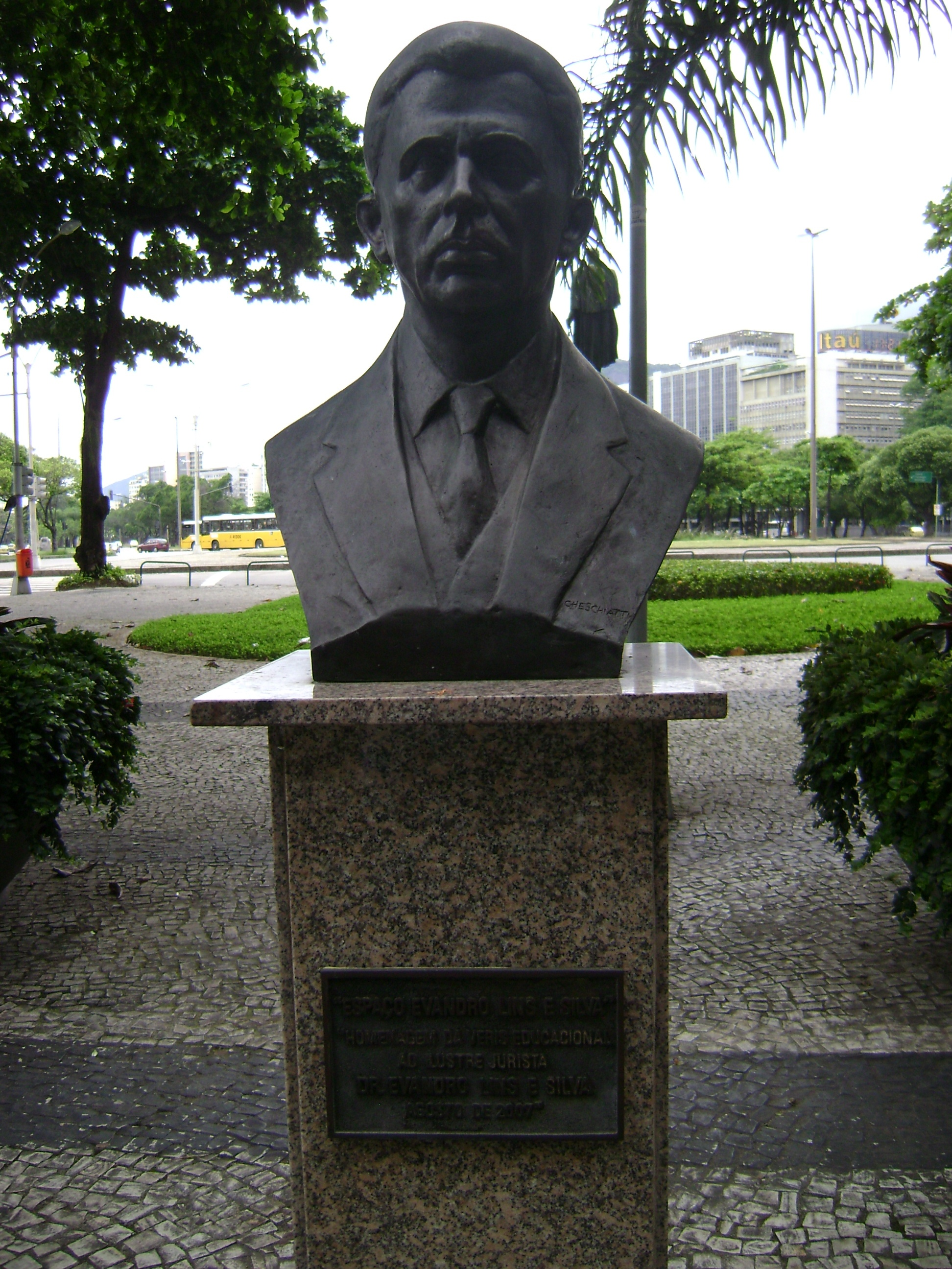 Estátua de Evandro Lins e Silva na cidade do Rio de Janeiro.